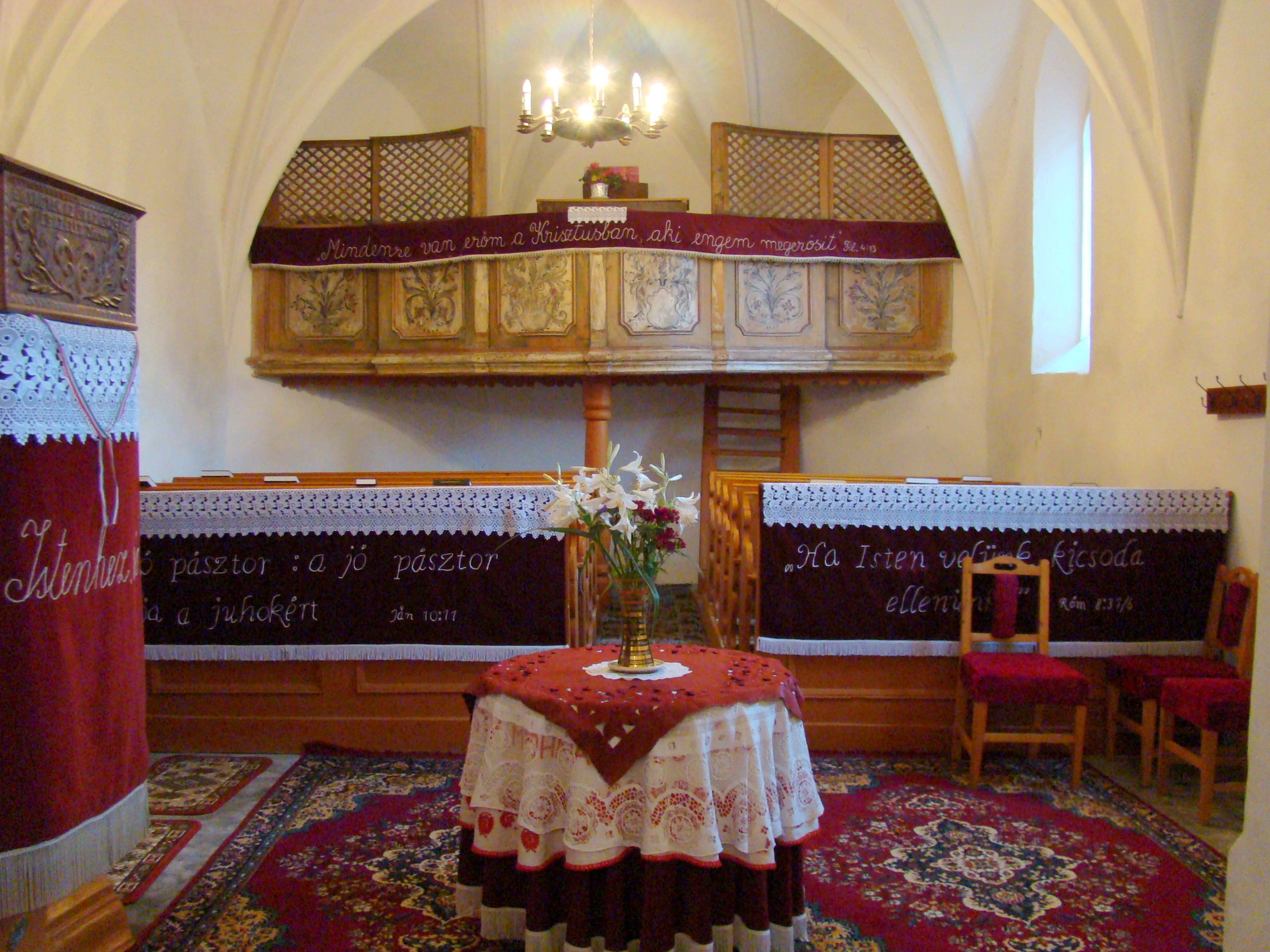 Biserica reformată, sat aparținător Sâncrai; municipiul Aiud, județul Alba 01